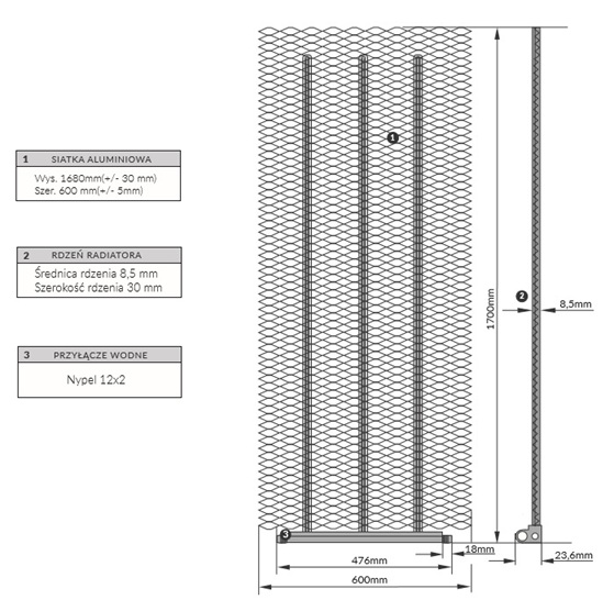 Rysunek techniczny grzejnika podtynkowego 3THERMO opracowany na podstawie materiałów producenta